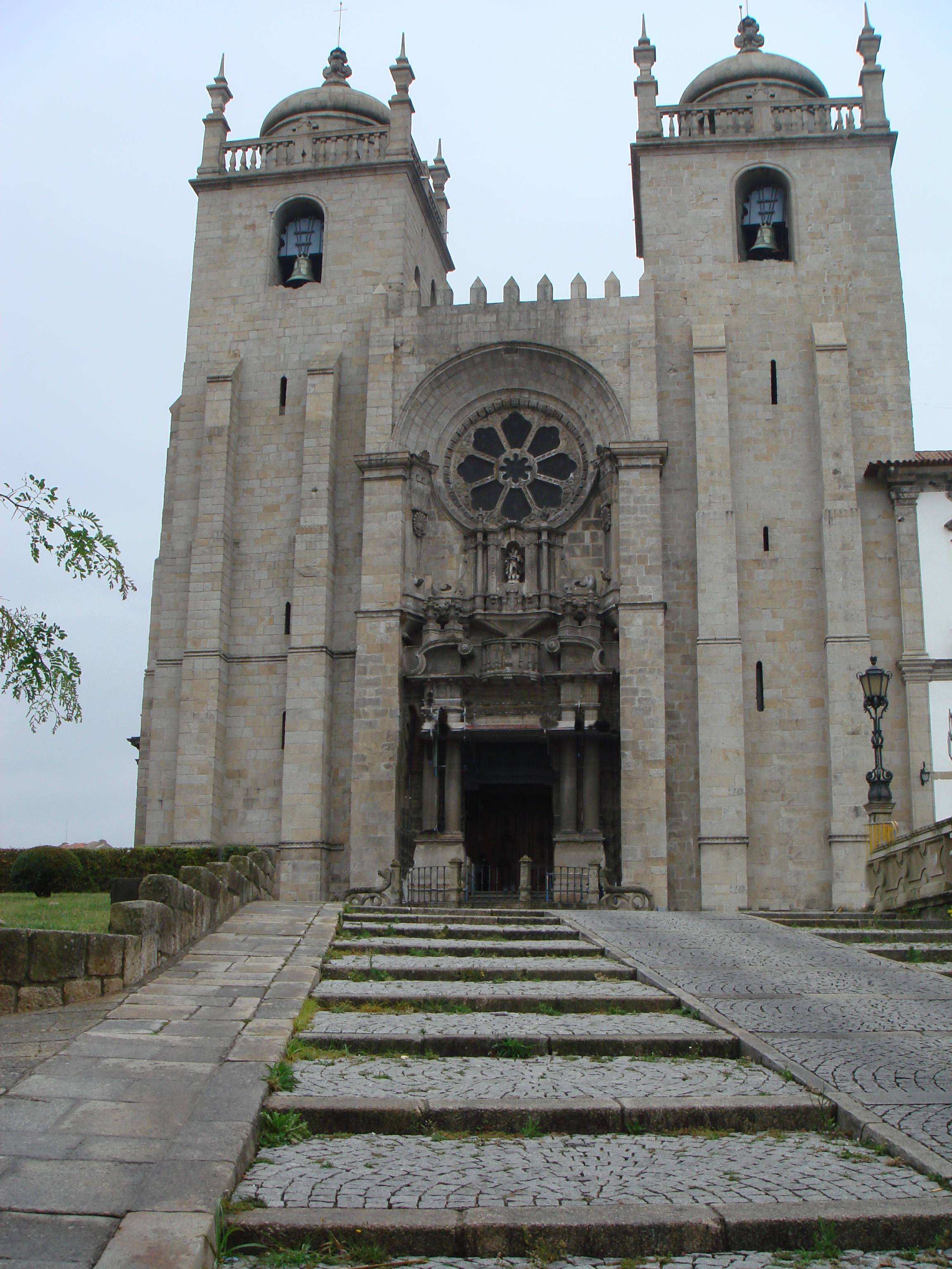 Porto Cathedral in Portugal. Calçada de Dom Pedro Pitões